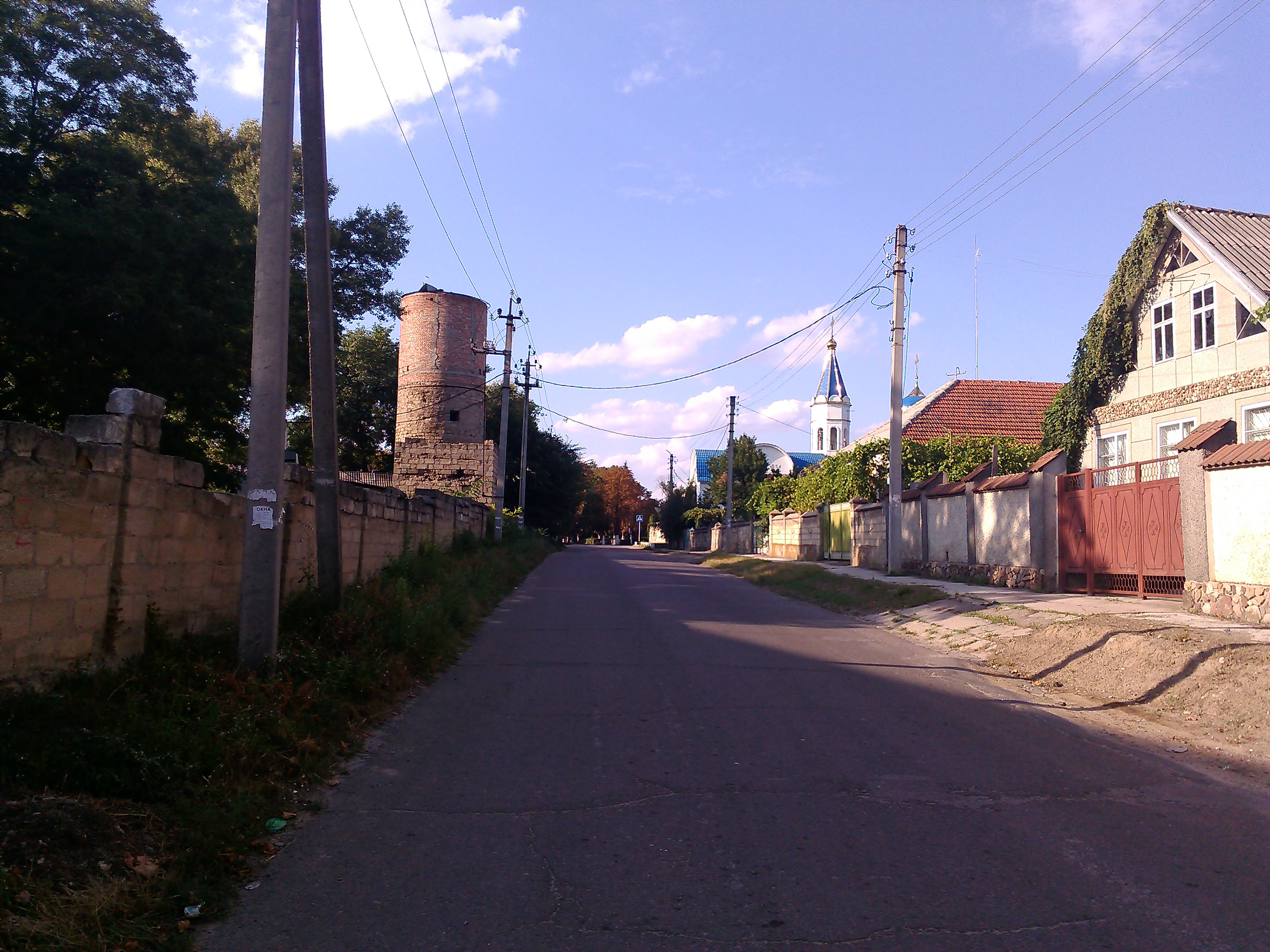 Eine Straße in Parkany